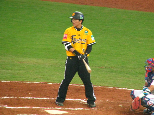 正在打擊的周思齊。